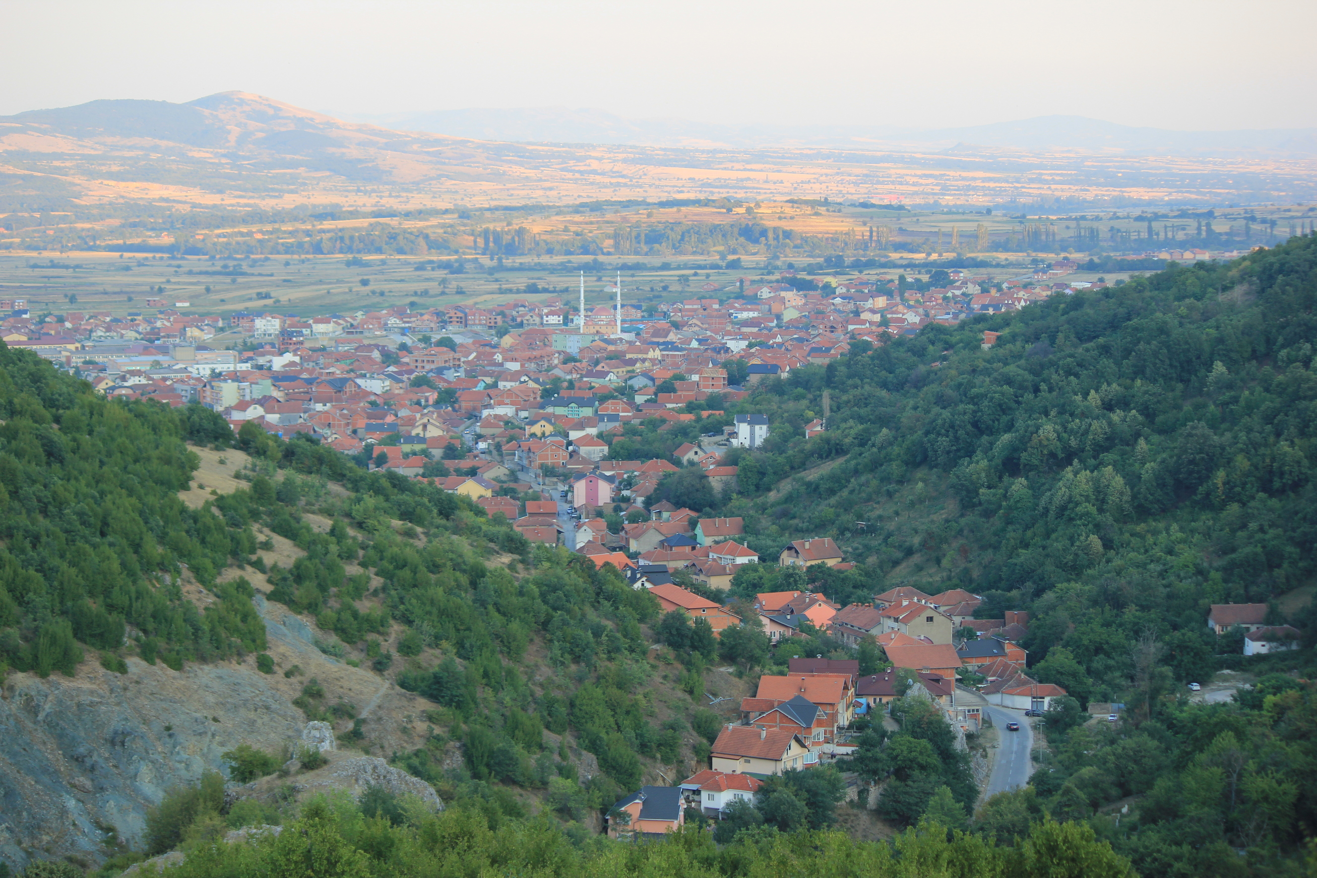 Blick auf Preševo, Südserbien.Hornjoserbsce: Pohlad města Preševo w južnej Serbiskej.